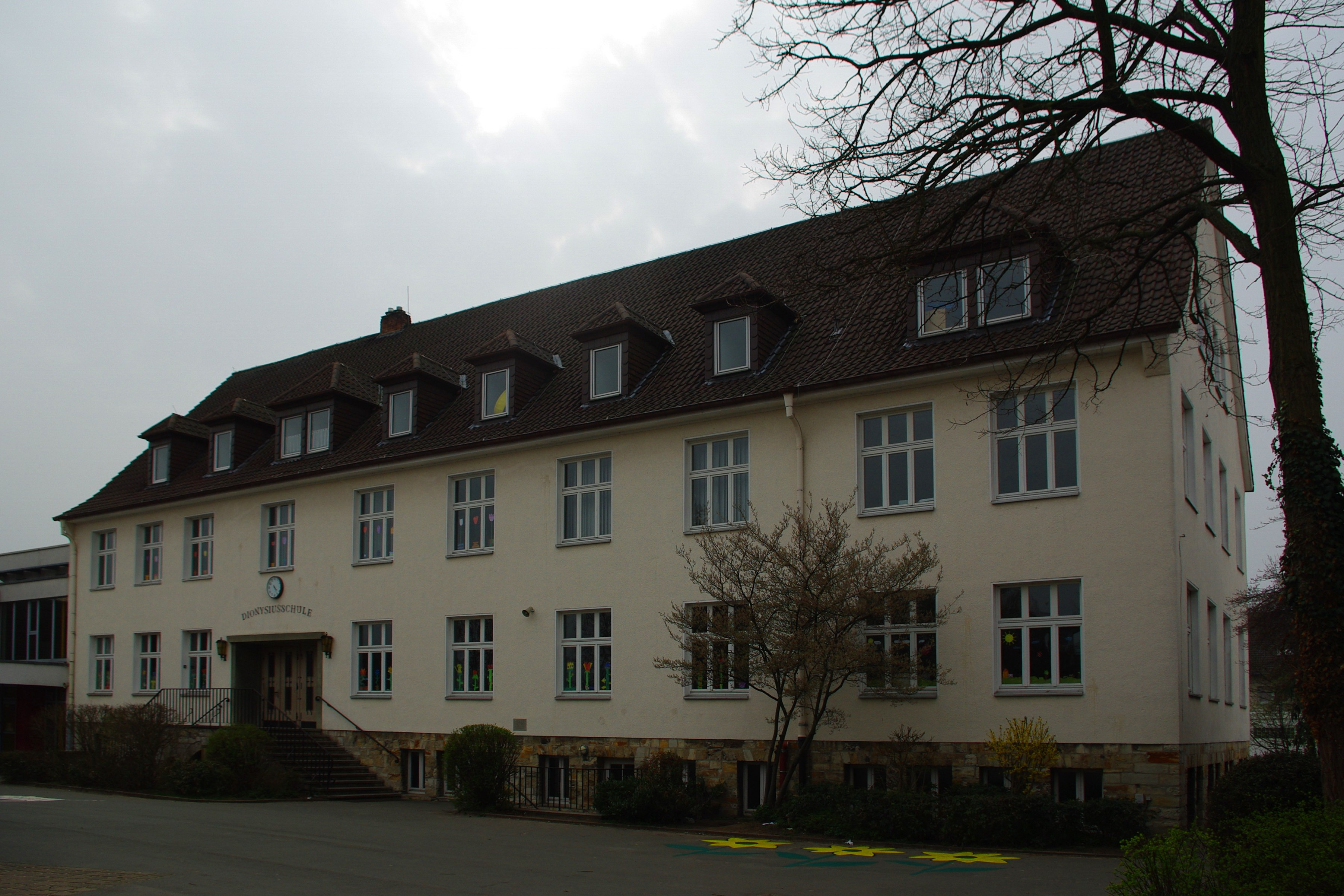 Elsen, Paderborn, Deutschland: Haupt- und ältestes Gebäude der St.-Dionysius-Grundschule.